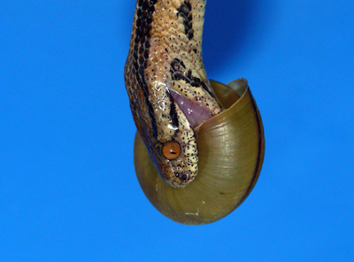 イワサキセダカヘビがシュリマイマイを食べているところ。